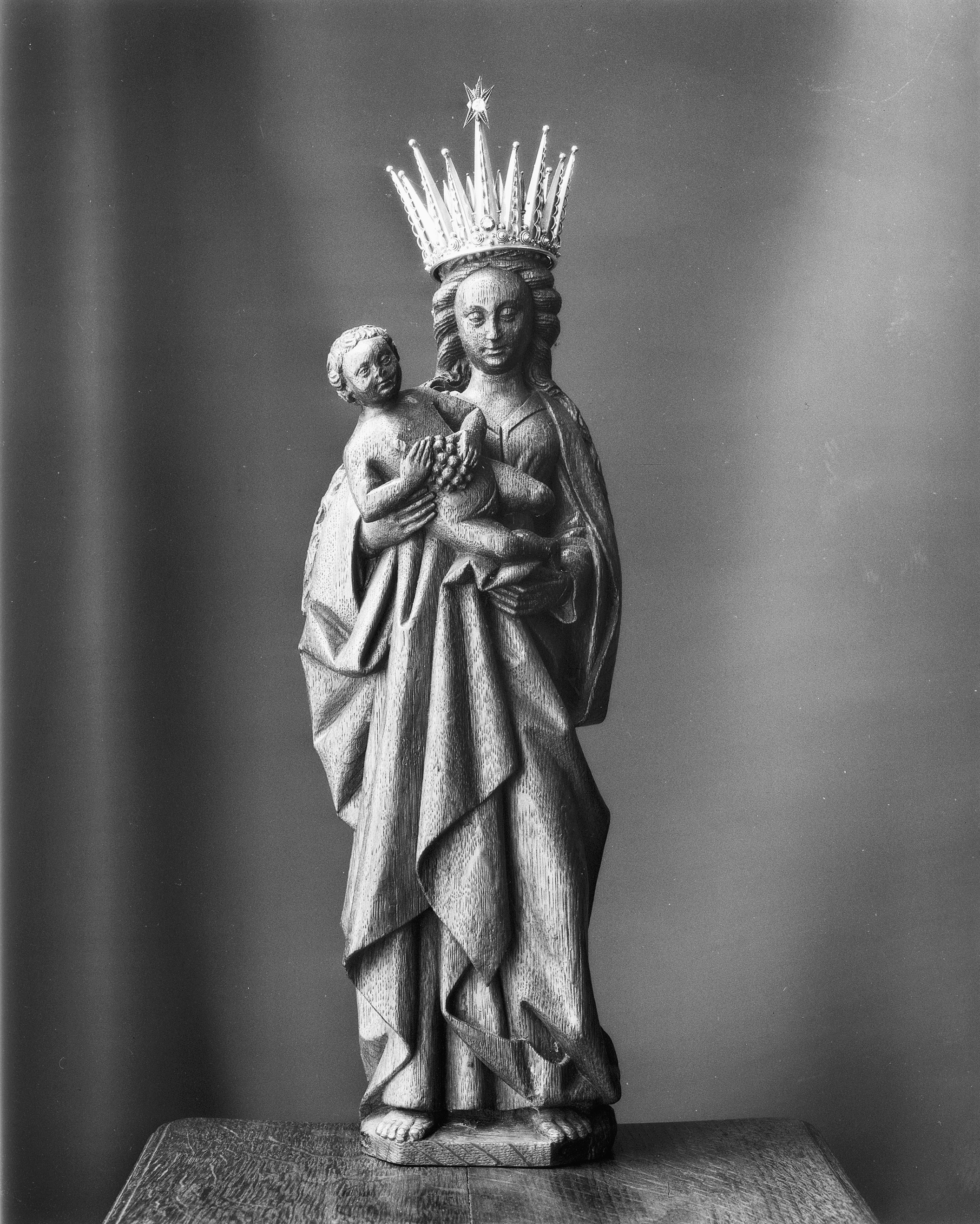 Rooms-Katholieke Kerk: laat gothische madonna